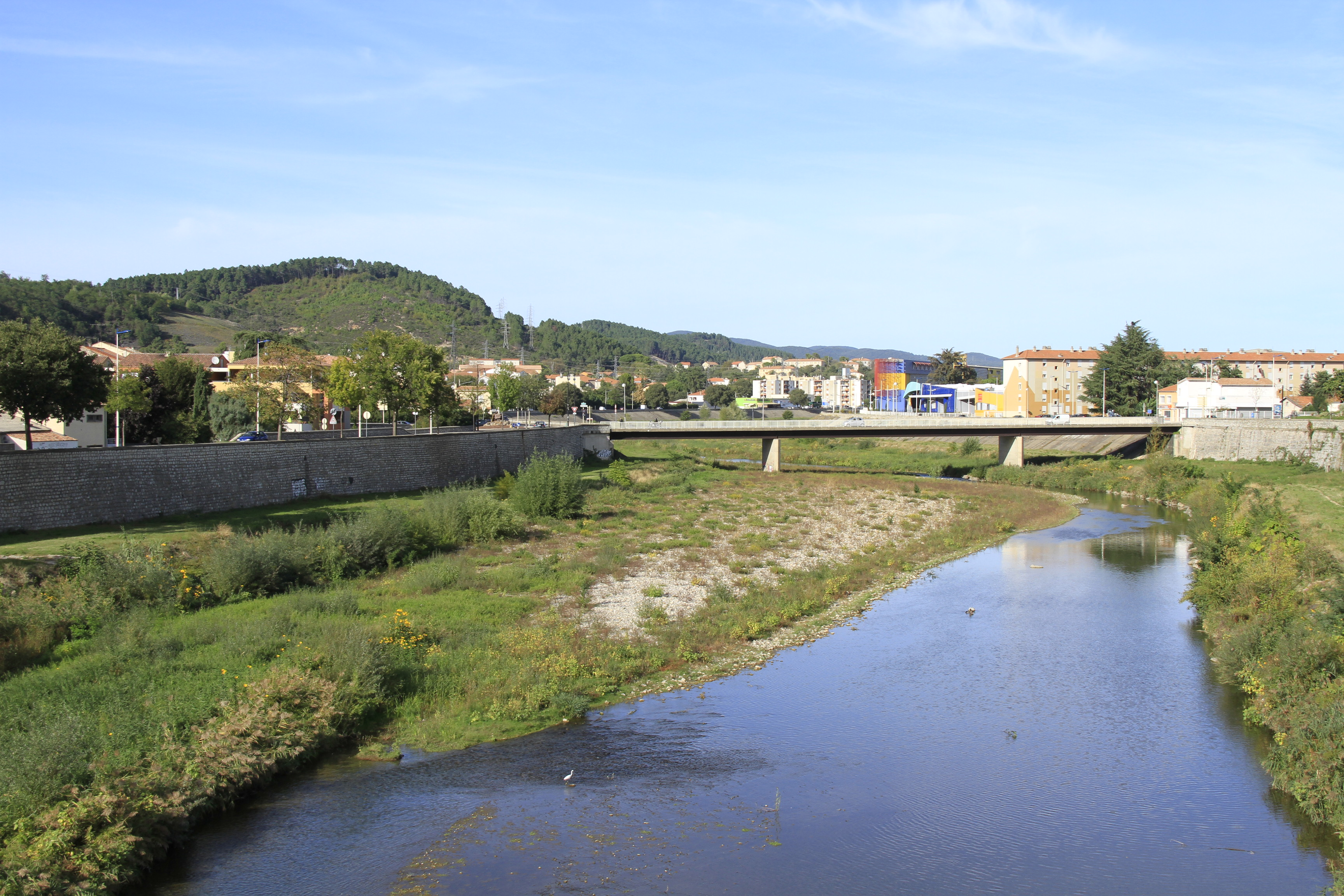 Alès, pont sur le Gardon en automne